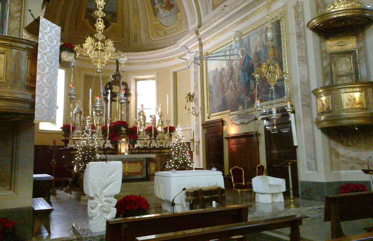 L'altar maggiore di Cornaredo parato a festa per il Natale 2012